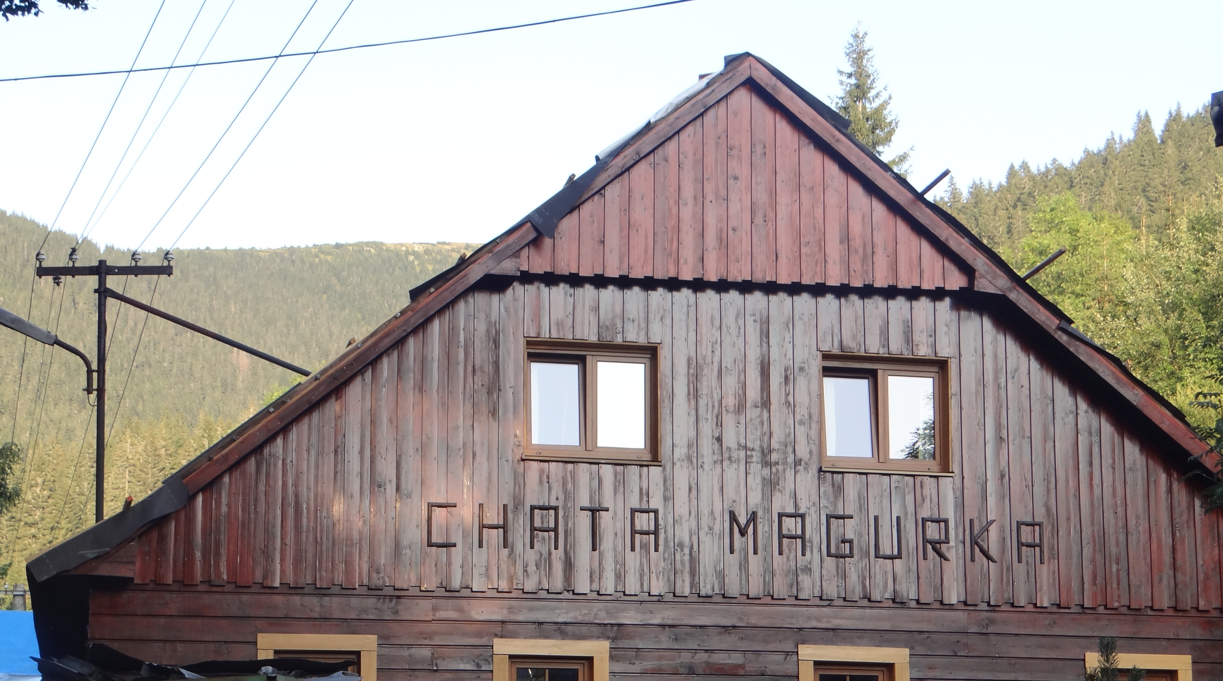 Chata Magurka w Niznych Tatrach (w Dolinie Lupczańskiej)